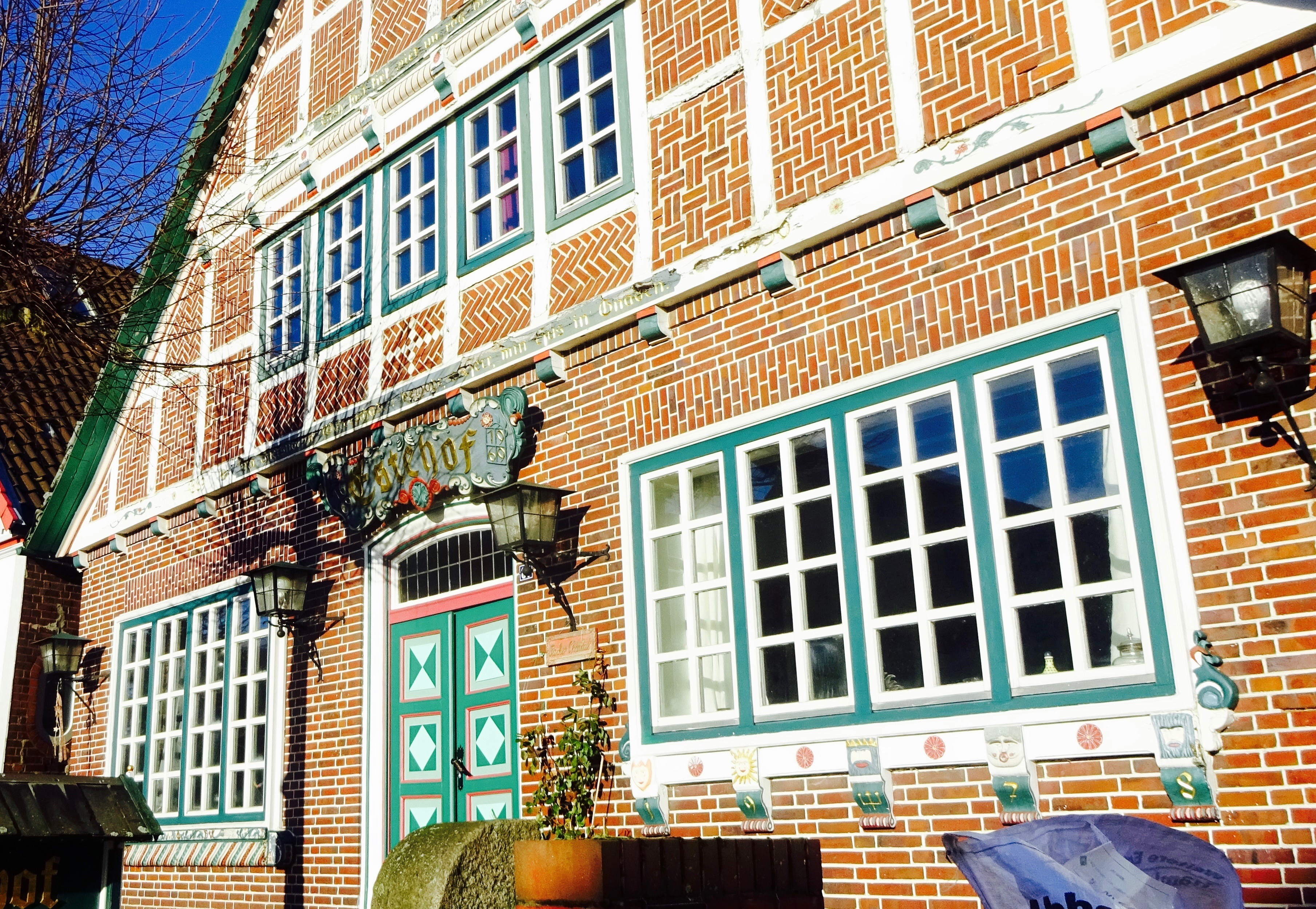 Front des Fachwerkhauses Estehof in Estebrügge